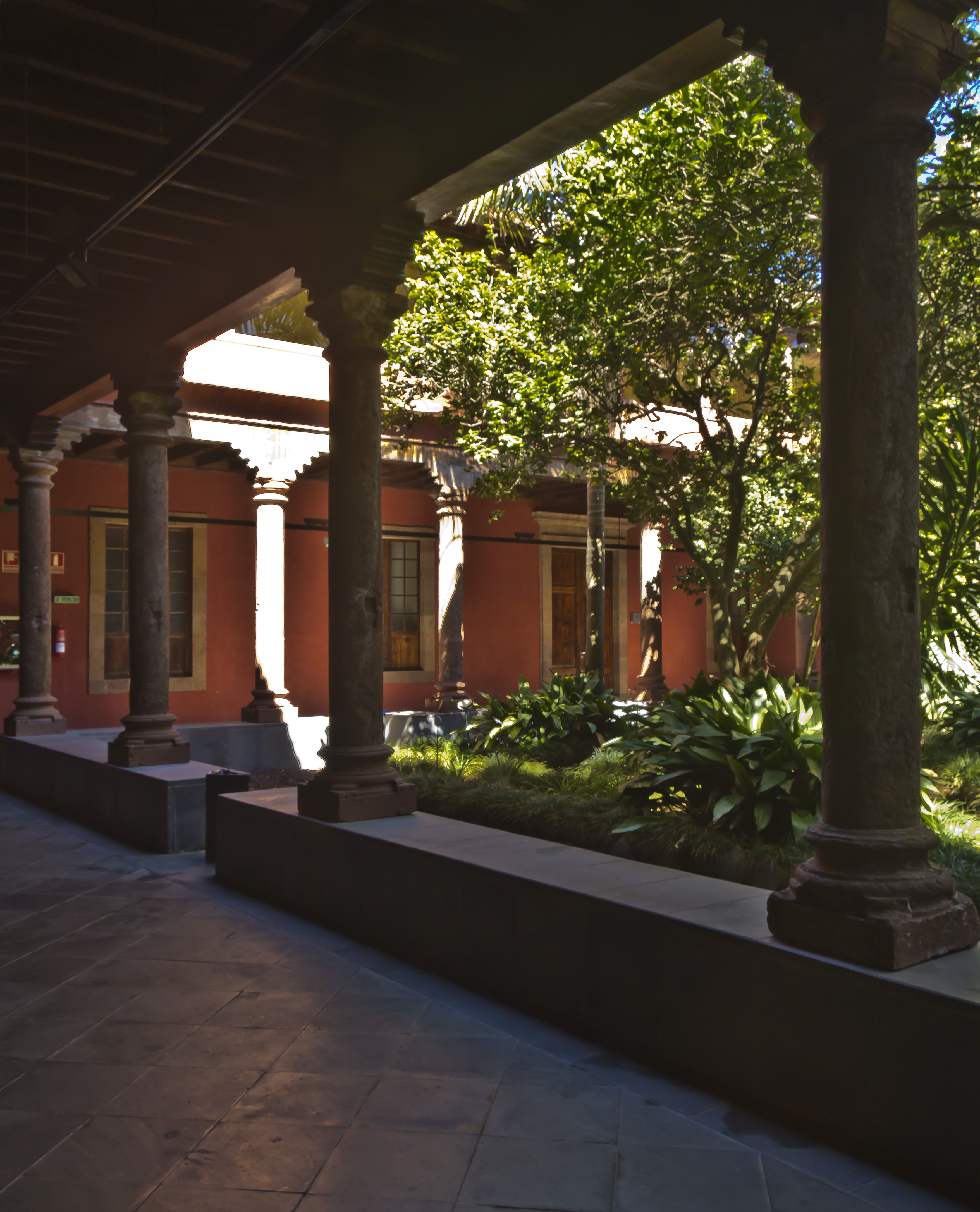 Patio des ehemaligen Klosters San Agustín in La Laguna